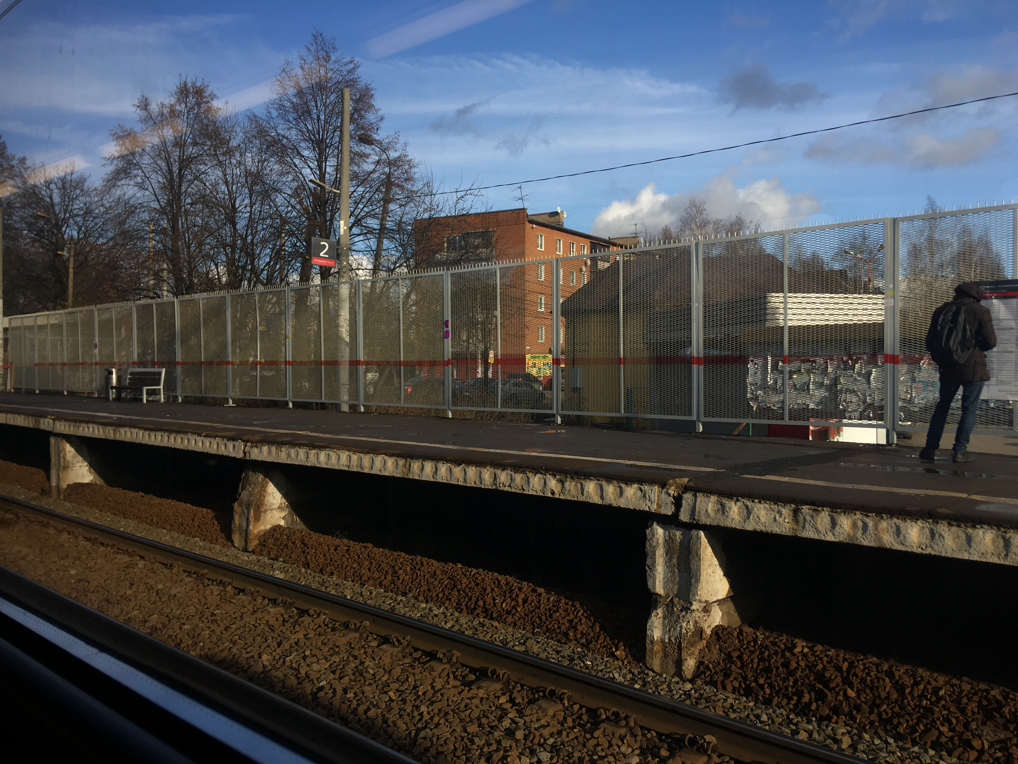 2019 год